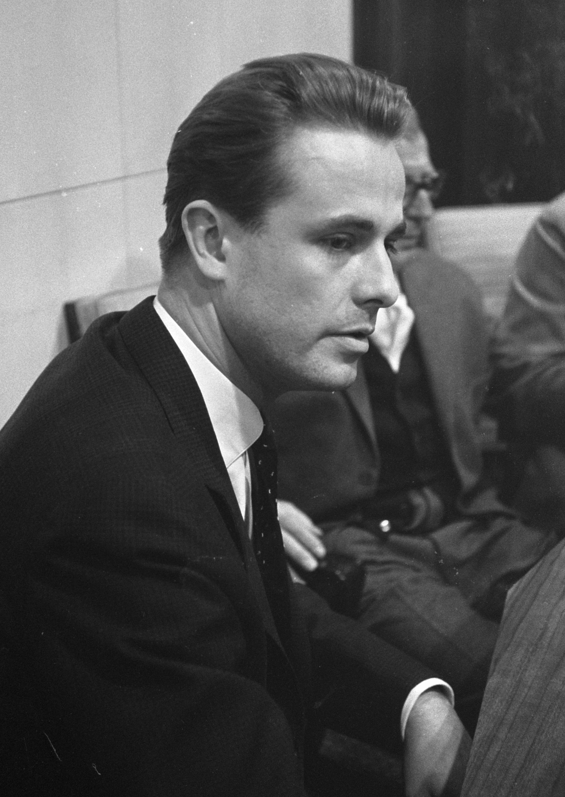 Aankomst Duitse filmacteur Joachim Hansen op Schiphol Joachim Hansen tijdens een persconferentie